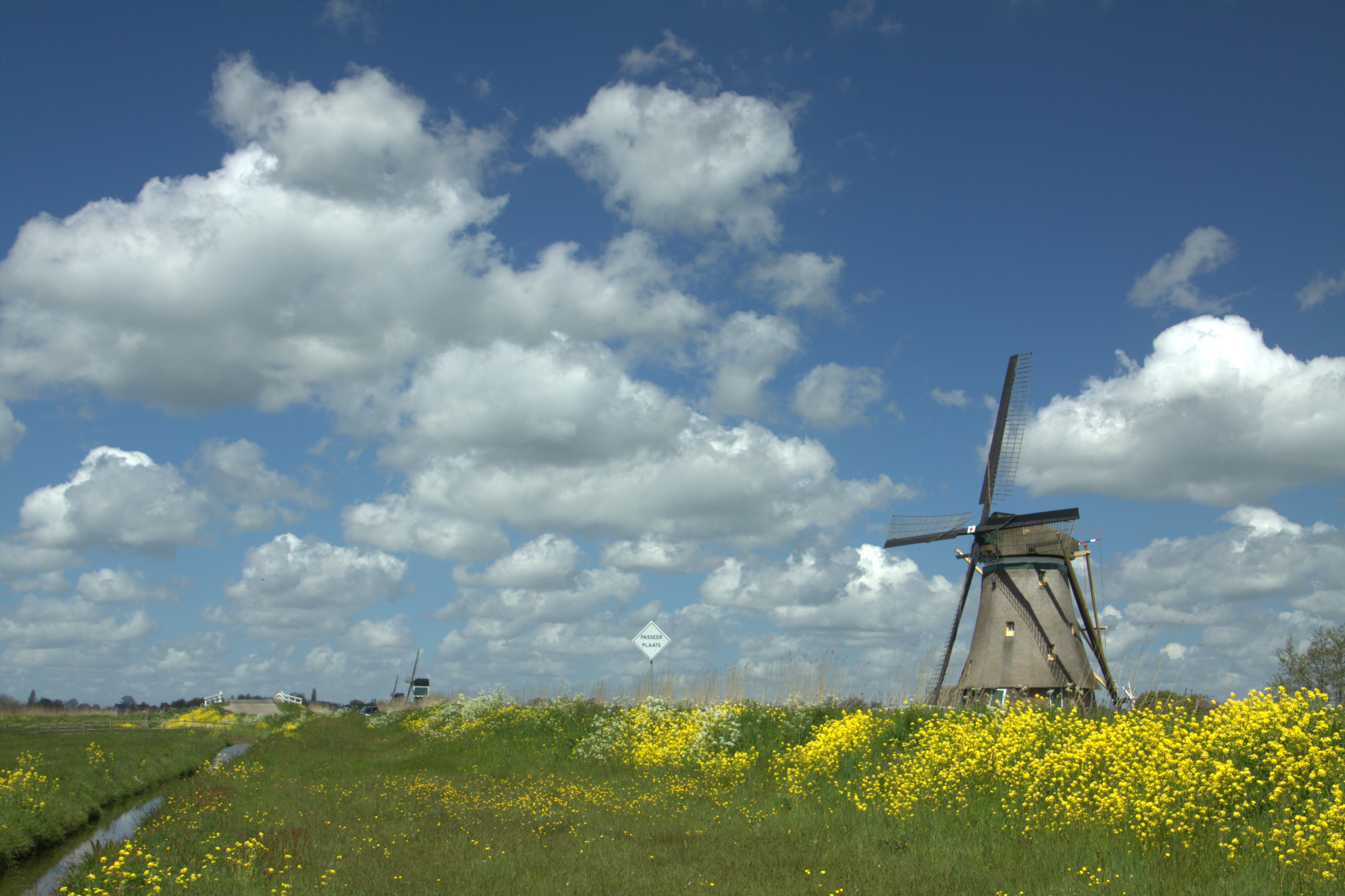 De Ammerssekade in het vroege voorjaar met molens aan de overkant van de Ammersche Boezem aan de Molenkade.